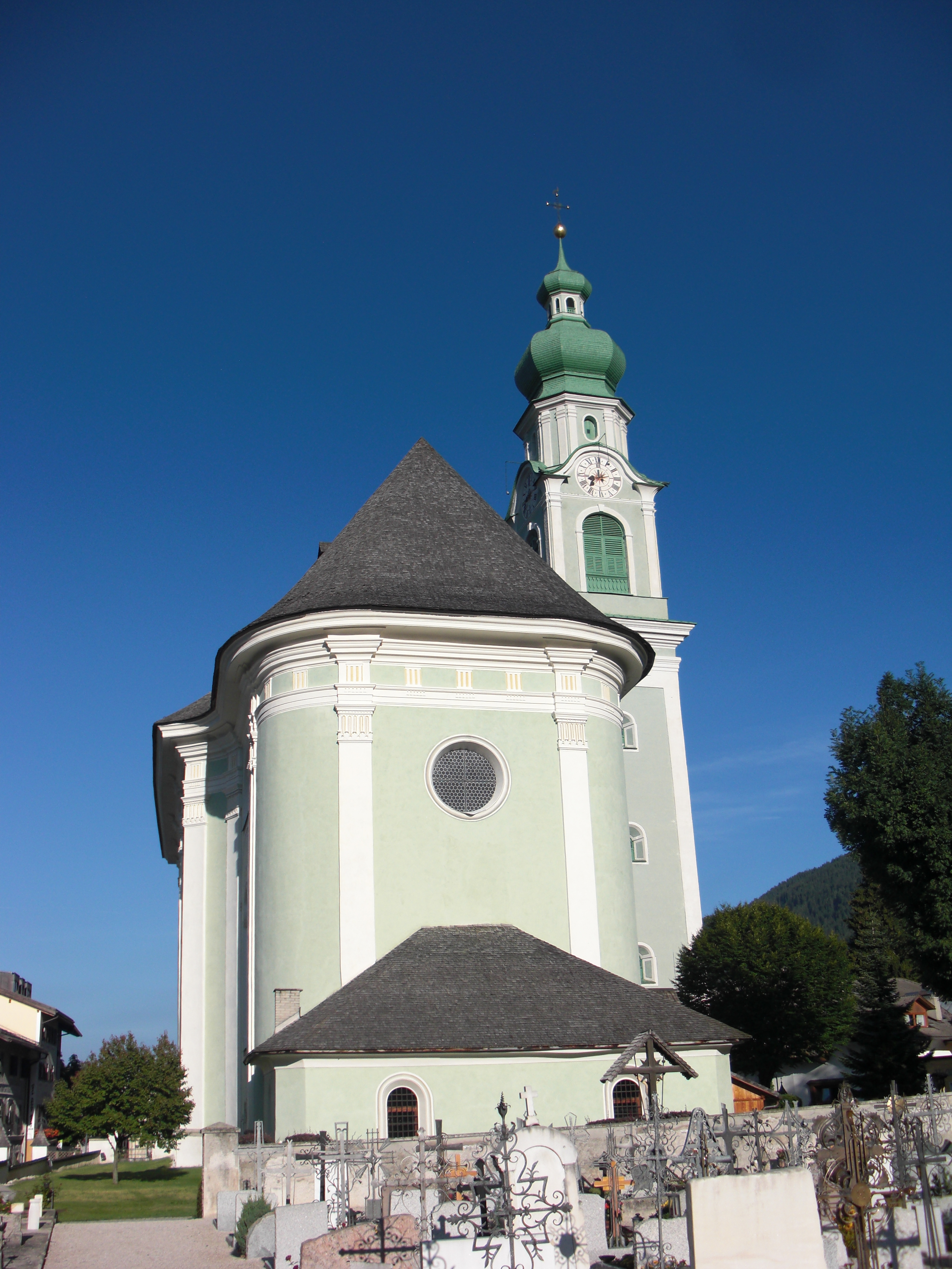 Pfarrkirche St. Johannes der Täufer mit Turm in Toblach, Südtirol, Italien.